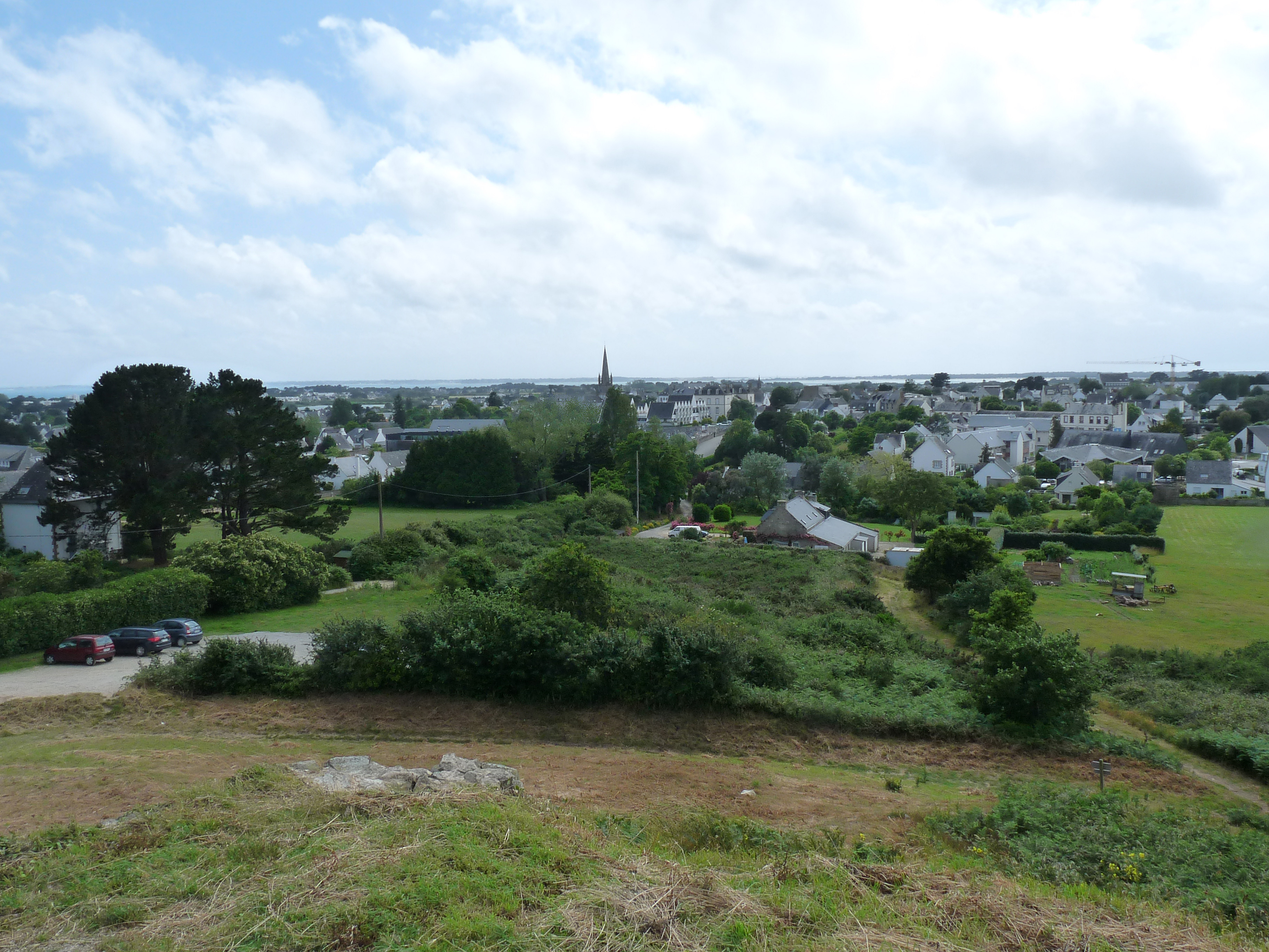 Vue sur Carnac (Morbihan) depuis le tumulus Saint-Michel